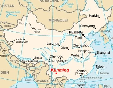 Lage der Stadt Kunming Format ist verkleinert und ein Punkt hinzugefügt